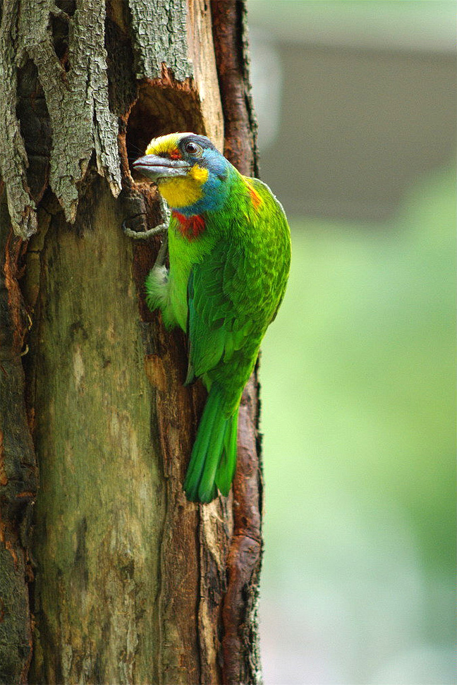 Taiwan Barbet